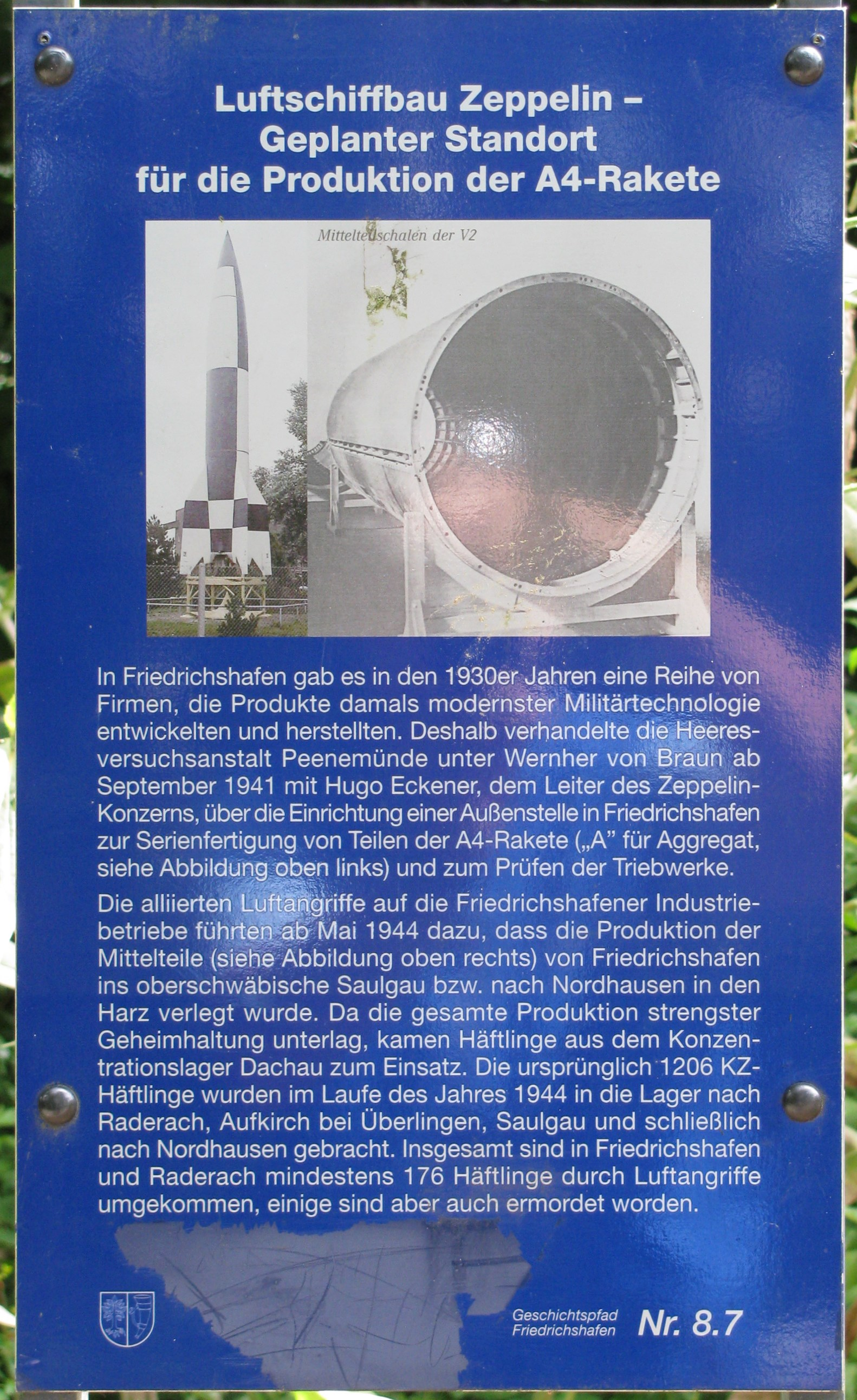 Deutschland - Baden-Württemberg - Bodenseekreis - Friedrichshafen: Geschichtspfad-Tafel 8.7 "Luftschiffbau Zeppelin - Geplanter Standortfür die Produktion der A4-Rakete"